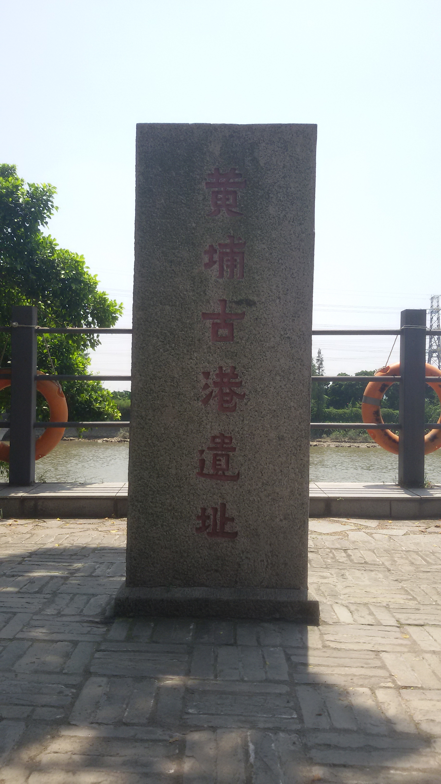 粵語: 黃埔古港遺址紀念碑